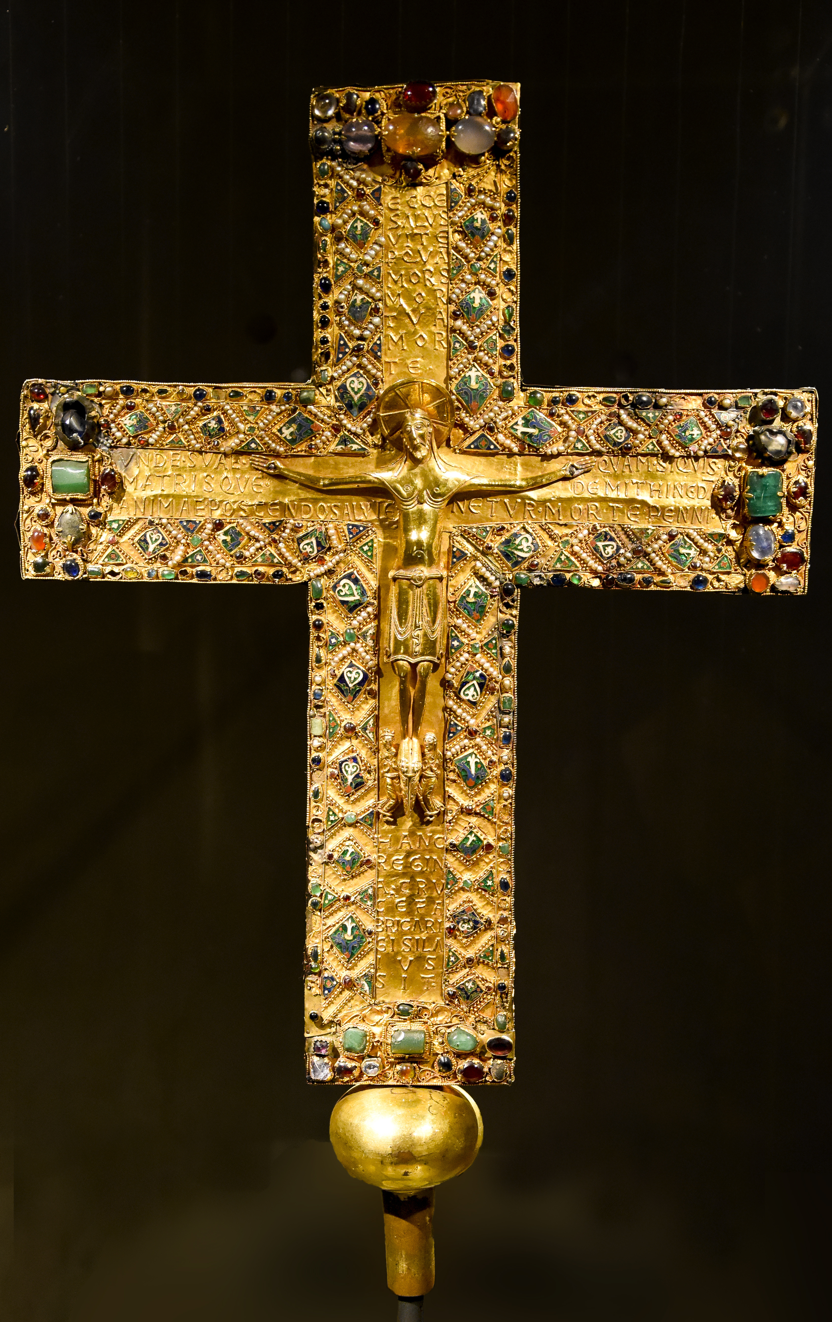 Kruis van Gisela van Bourgondië (ca. 1006) Residenz Museum München